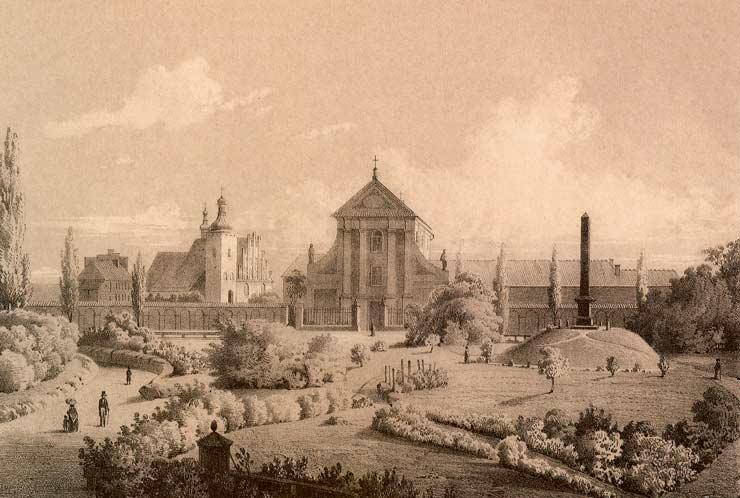 Kościół powizytkowski, kościół XX. Kapucynów i pomnik Unii Lubelskiej w Lublinie, litografia Adama Lerue.